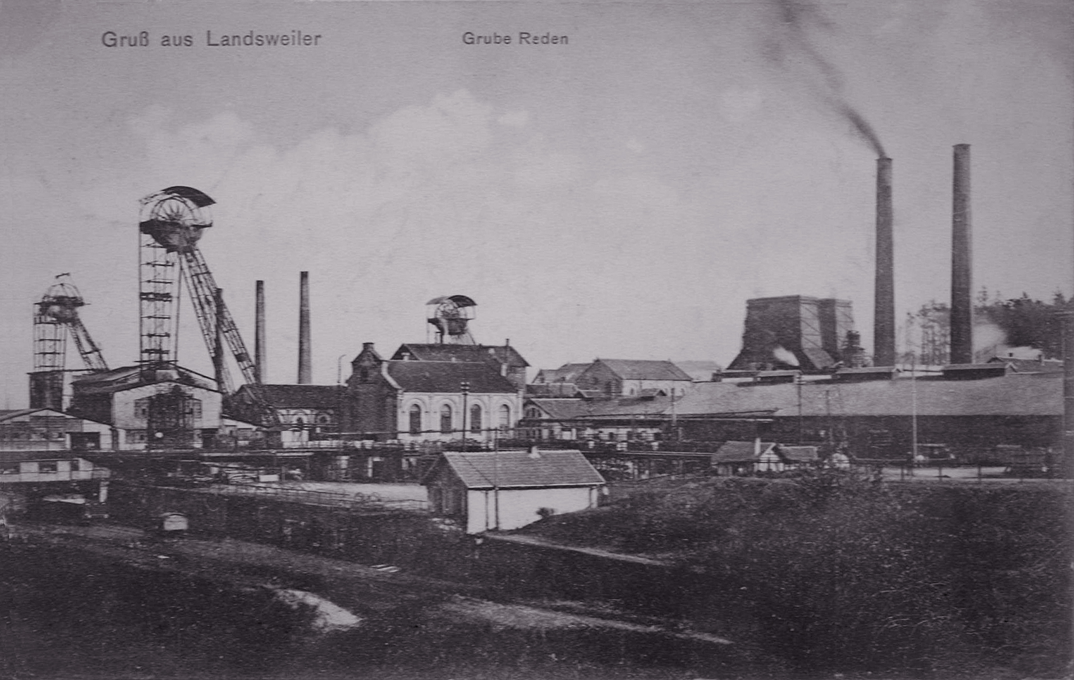 Alte Postkarte um 1900 Grube Reden